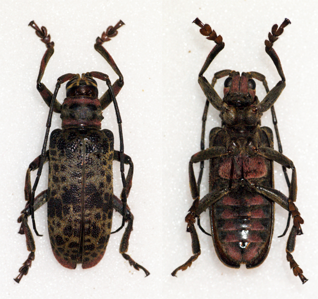 Fabricius,1787 Sex: Female Data: 03-2013 - Mt Kloto - Togo Size: ?